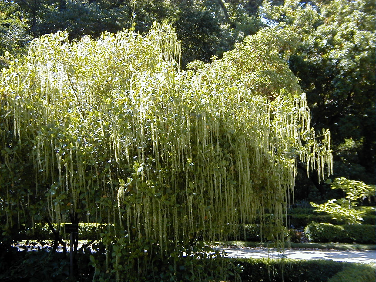 Itea illicifolia. Real Jardín Botánico, Madrid.